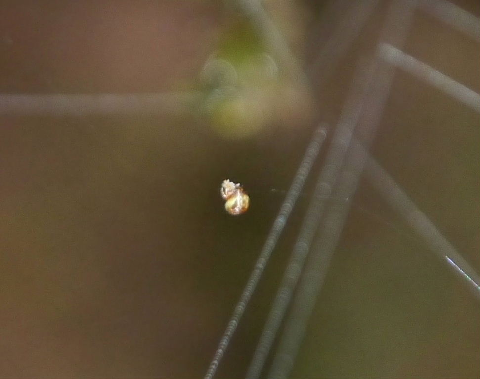 Ogulnius pullus：ヤマジグモ 2015/08/14 和歌山県田辺市：Tanabe City. Wakayama Pref. Japan